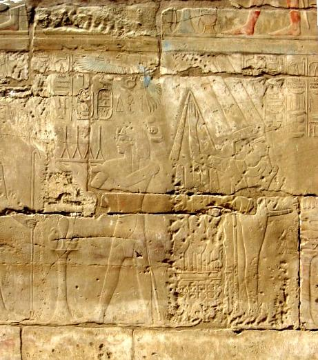 Eigen foto Luxor Ben Pirard januari 2007